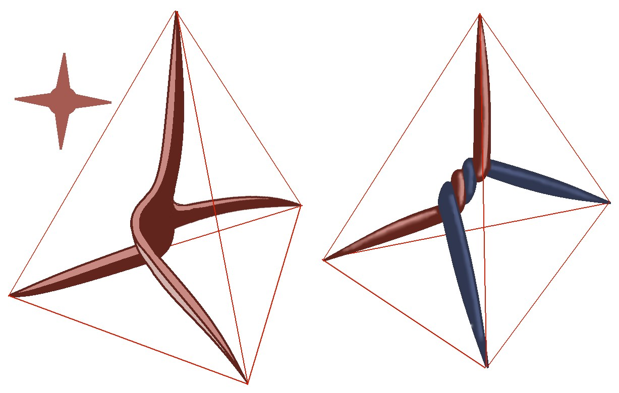 graphique :--Ssire (talk) 12:34, 28 November 2013 (UTC)